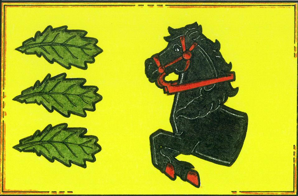 Česky: vlajka obce Horní Kněžeklady